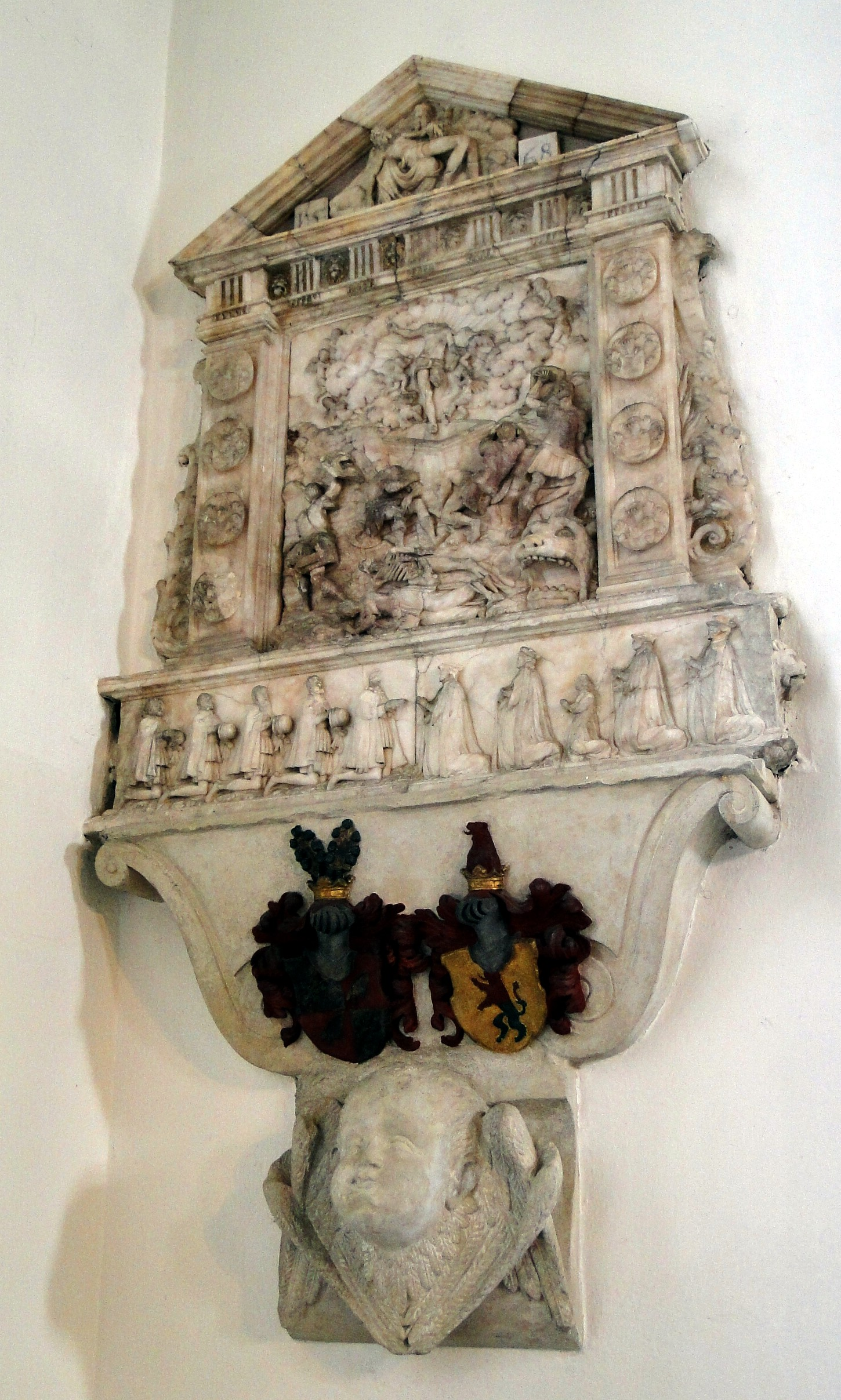 Die Weinbergkirche in Dresden-Pillnitz